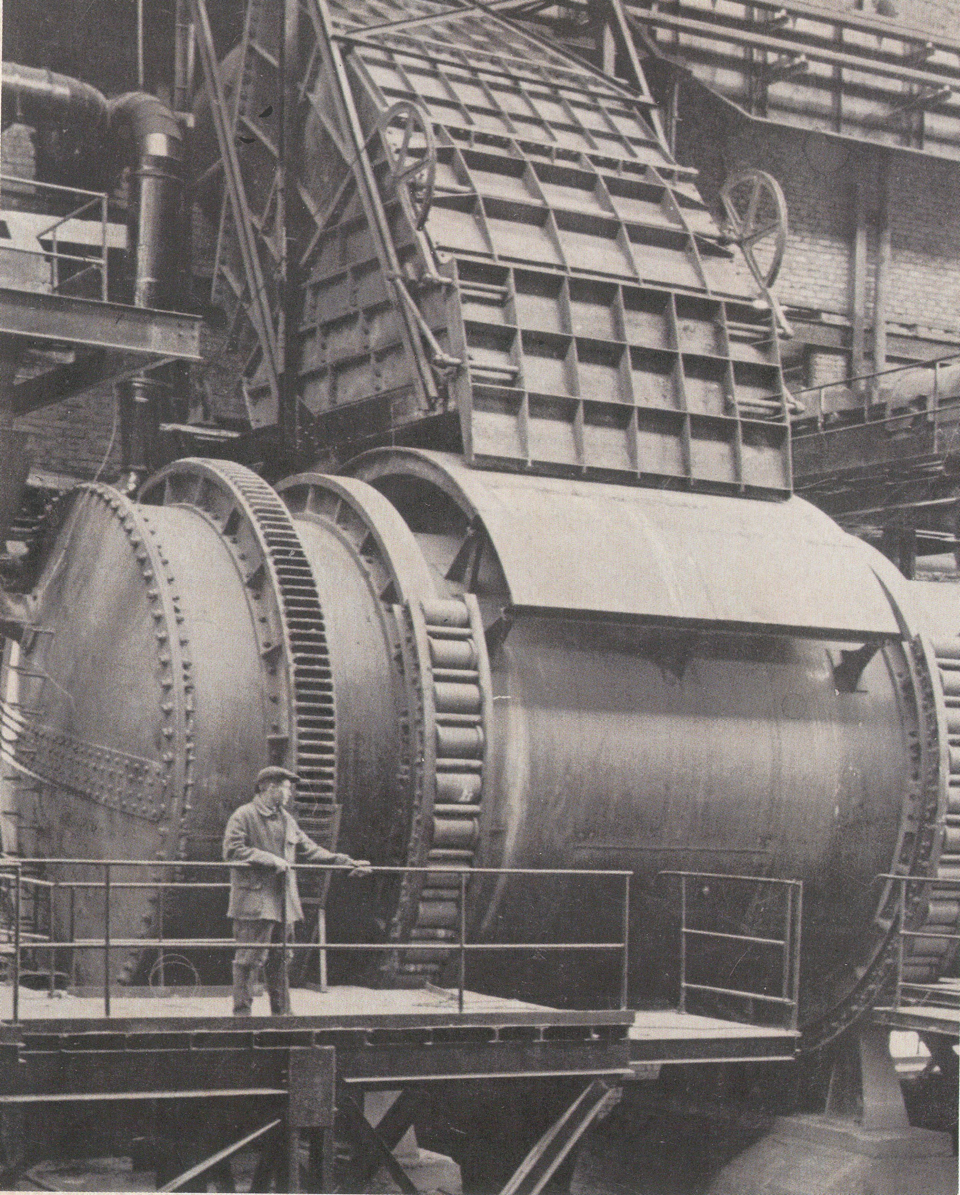 СУМЗ. Общий вид конвертера со стороны цеха